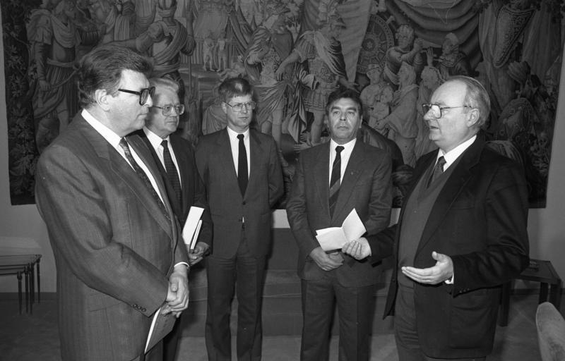 19.1.1987 Der Vorsitzende des 3. Untersuchungsausschusses des Deutschen Bundestages - Neue Heimat -, Minister des Bundestages, Heinz Günther Hüsch (CDU, rechts), übergibt dem Präsidenten des Deutschen Bundestages, Dr. Philipp Jenninger (links), den öffentlichen Bericht sowie die Minderheitenvoten des Ausschusses. Von Seiten des Ausschusses nahmen außerdem der Stellvertretende Vorsitzende, Minister des Bundestages, Gernot Fischer (SPD, 2. v. re.), und der Ausschußsekretär, RD Reckzie (3. v. re.) teil. 2. v. l.: Bundestagsdirektor Dr. Joseph Bücker